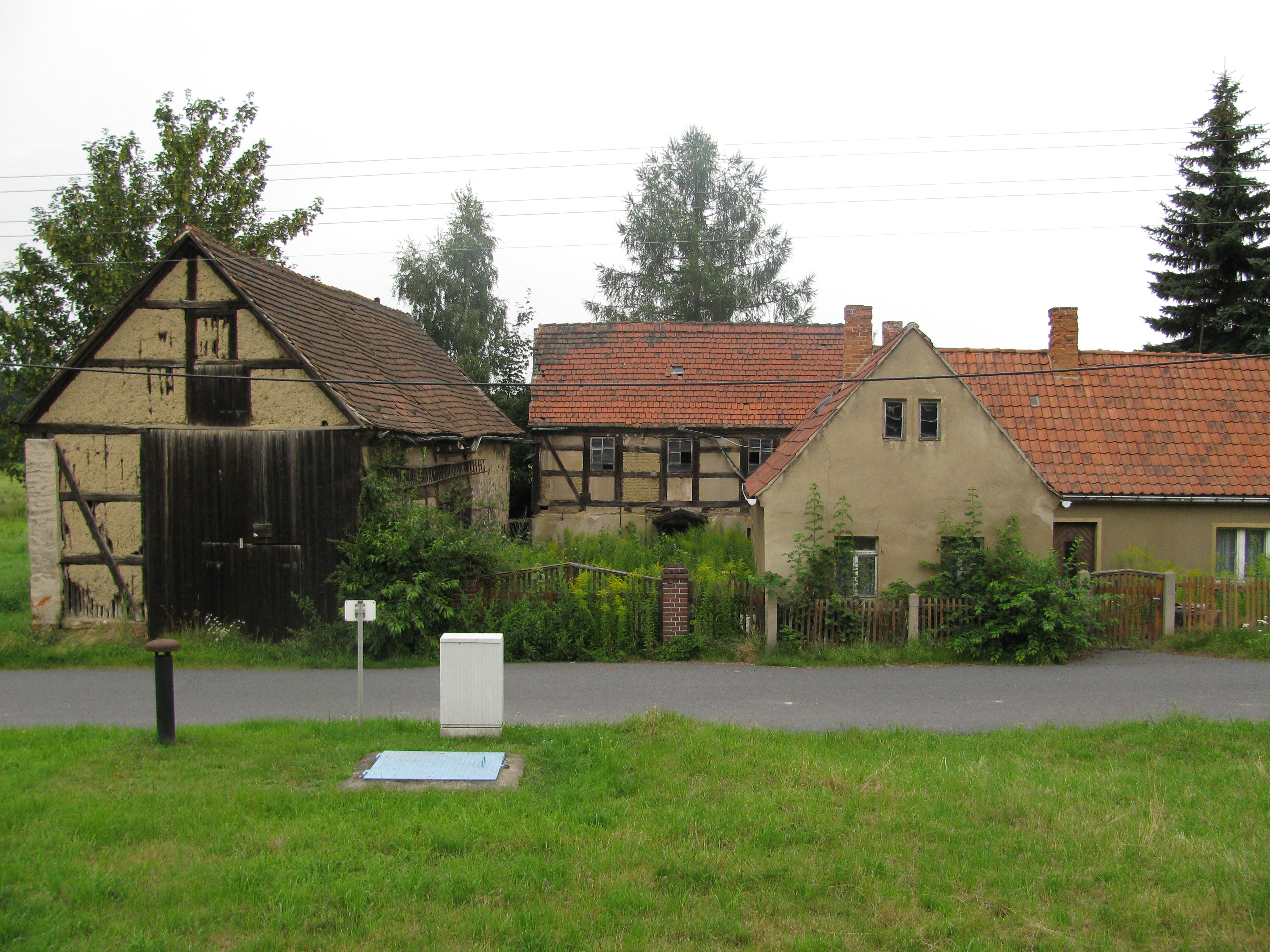 Alter, verlassener Hof im Ortsteil Neuer Anbau, Weinböhla, Landkreis Meißen, Sachsen